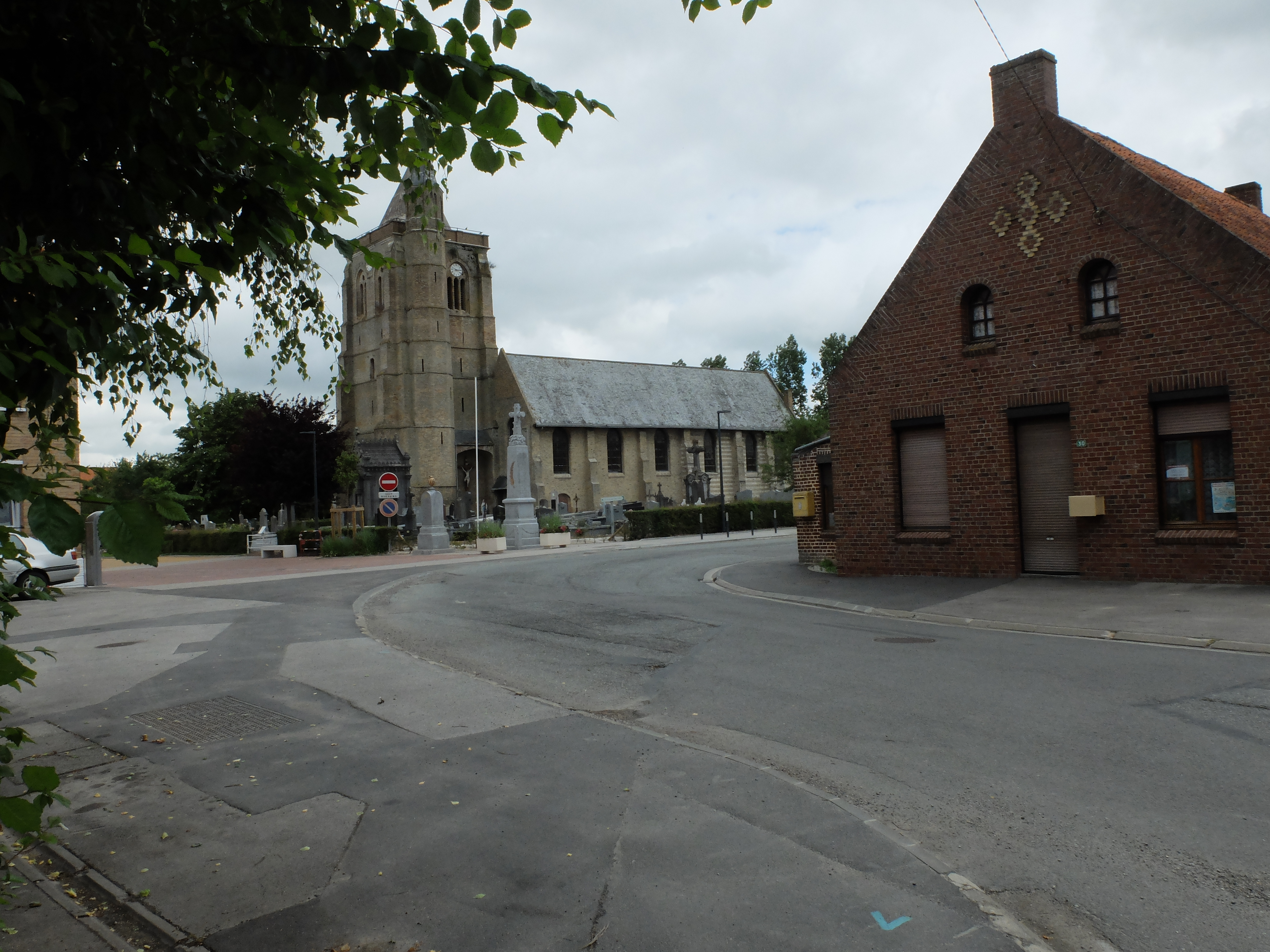 Vue de la rue de l'église et de l'église de l'Assomption-de-Notre-Dame de Lederzeele.